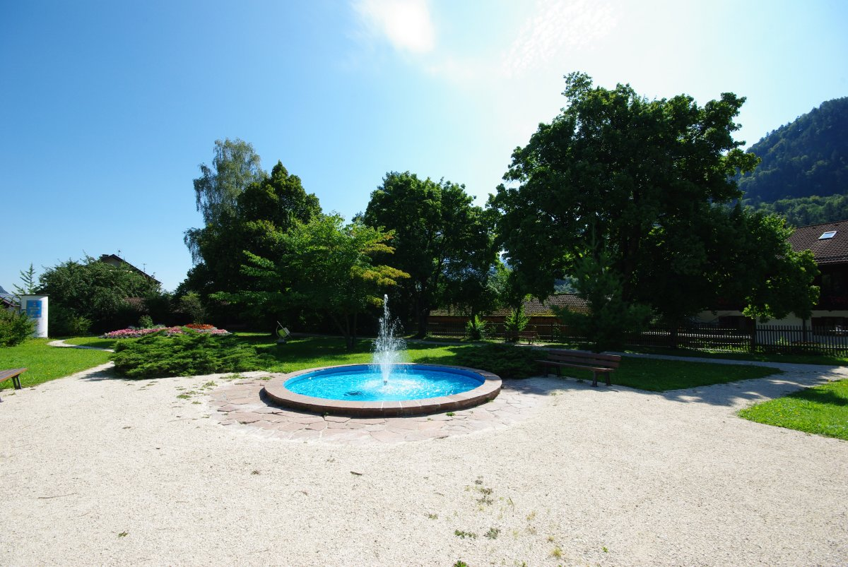 Kurpark Karlstein